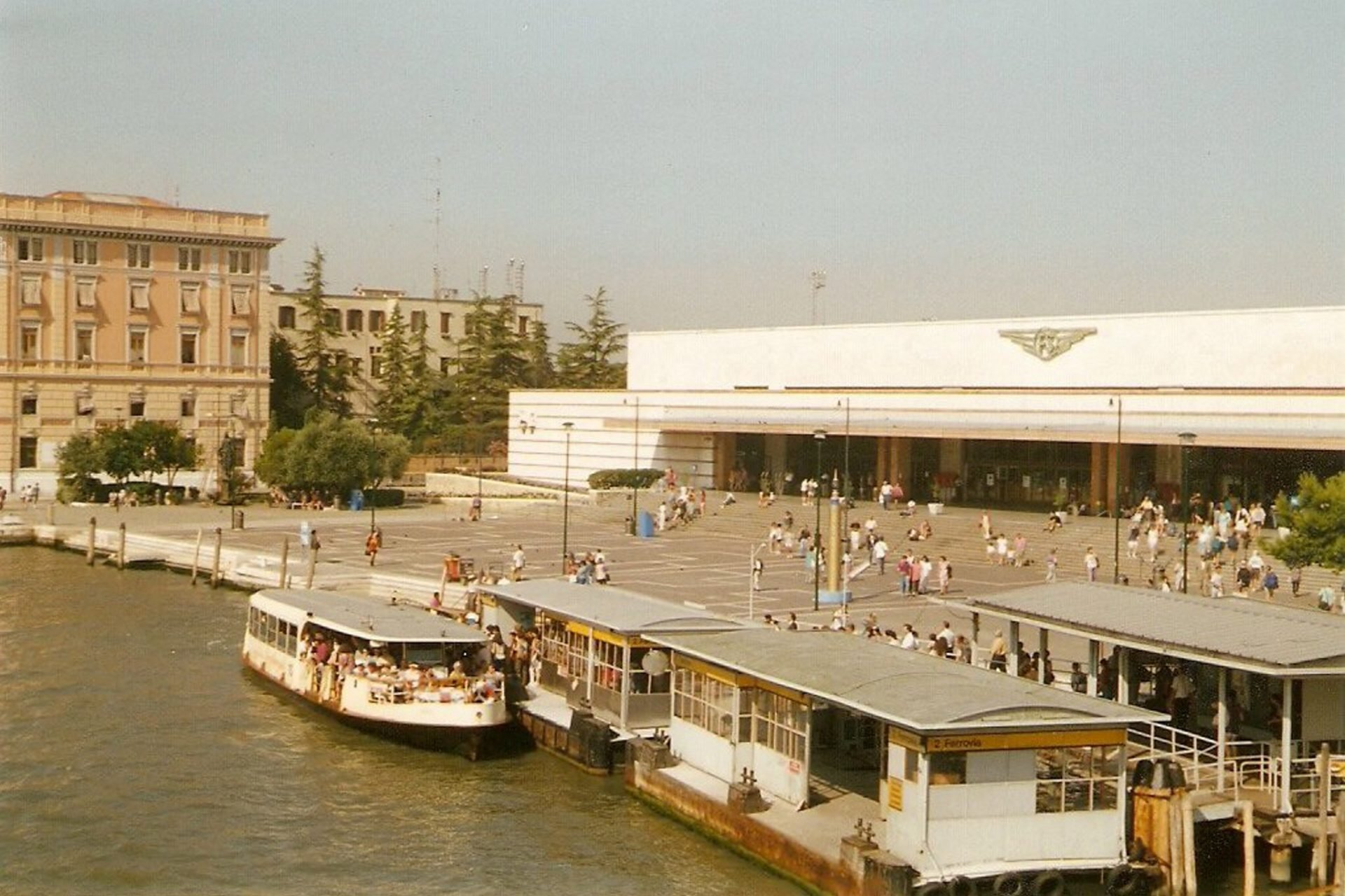 Benátky (Venezia)